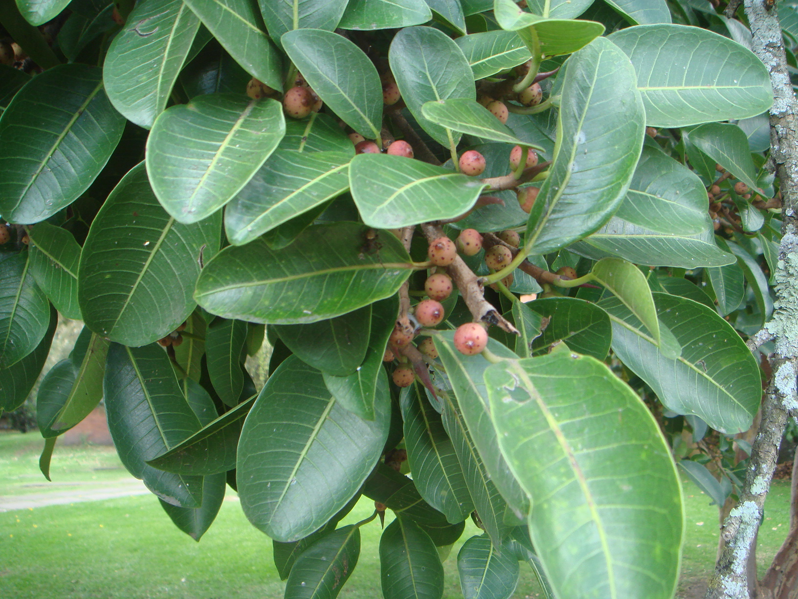 Caucho sabanero (Ficus soatensis) Jardín Botánico de Bogotá, Colombia.